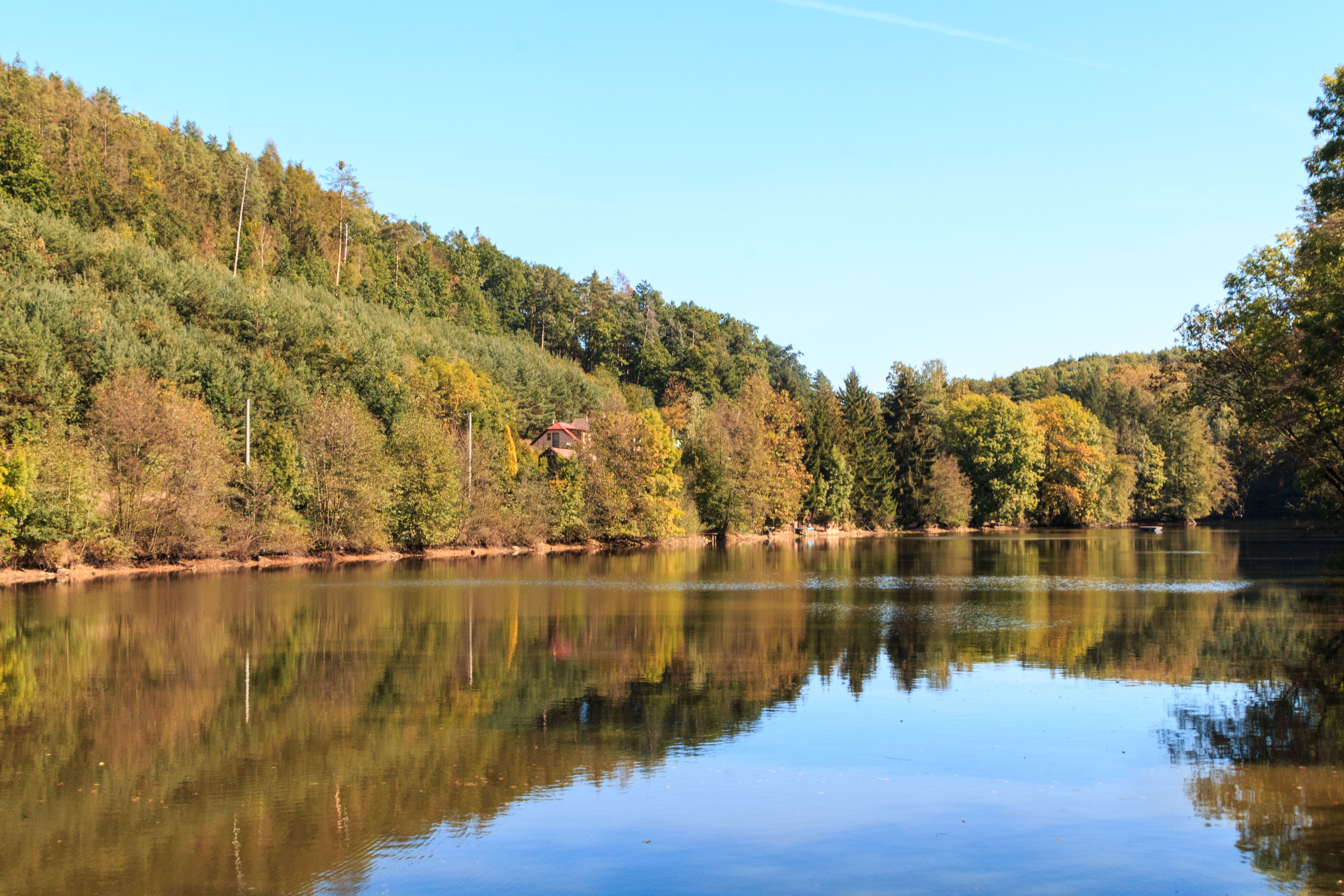 Drhlenský rybník Project: Vodstvo.